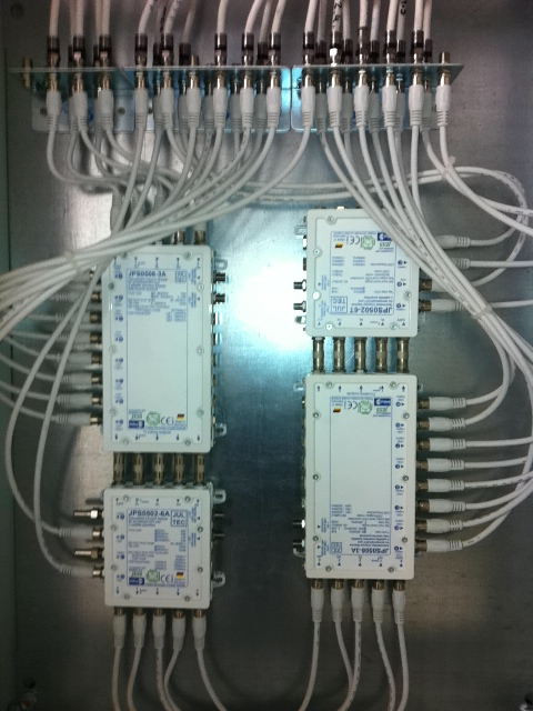 2x Jultec JPS0508-3A, 1x Jultec JPS0502-6A, 1x Jultec JPS0502-6. LNB-Stromversorung über vorangesetzten Verstärker, alle Kabel auf Potentialausgleich (Erdungsblock) gesezt